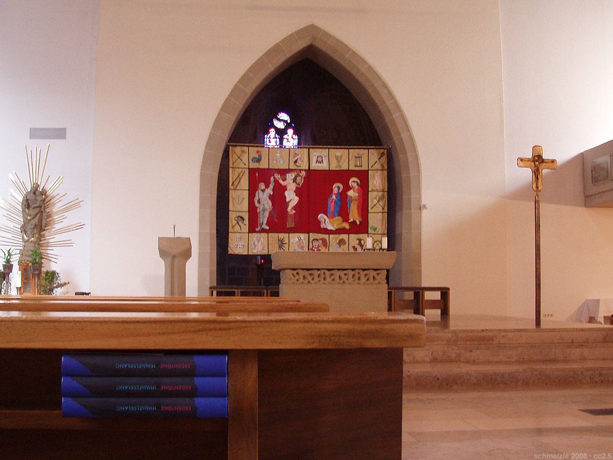 Kath. Pfarrkirche Unsere Liebe Frau in Eppingen, Blick zum Altar